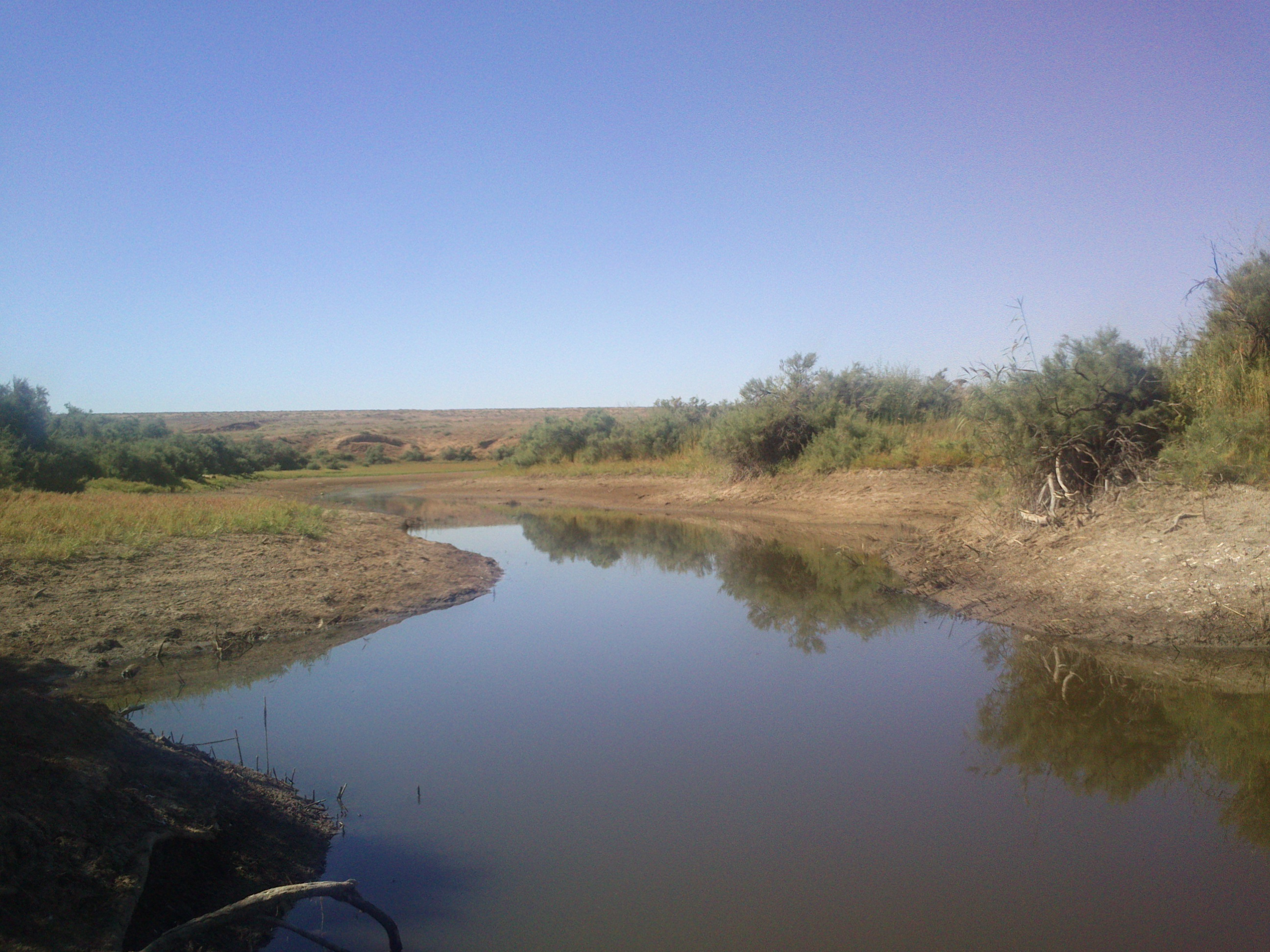 Река Яшкуль